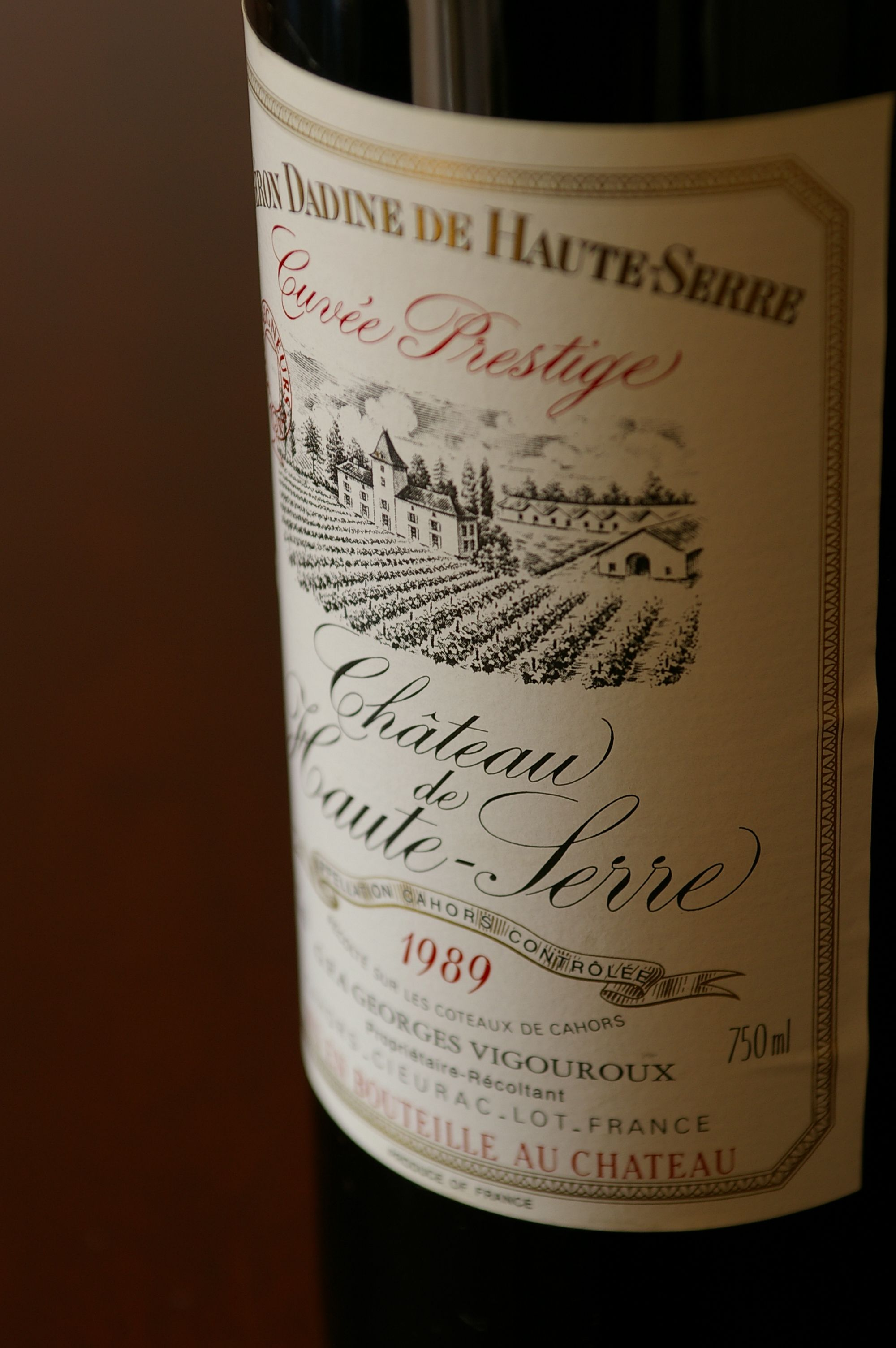 Cuvée Géron Dadine de Haute Cuvée Prestige 1989 - 46230 CIEURAC